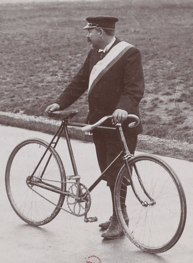 [Collection Jules Beau. Photographie sportive] : T. 14. Année 1901 / Jules Beau : F. 29. Paris - Brest, [Parc des Princes, 15 août 1901]